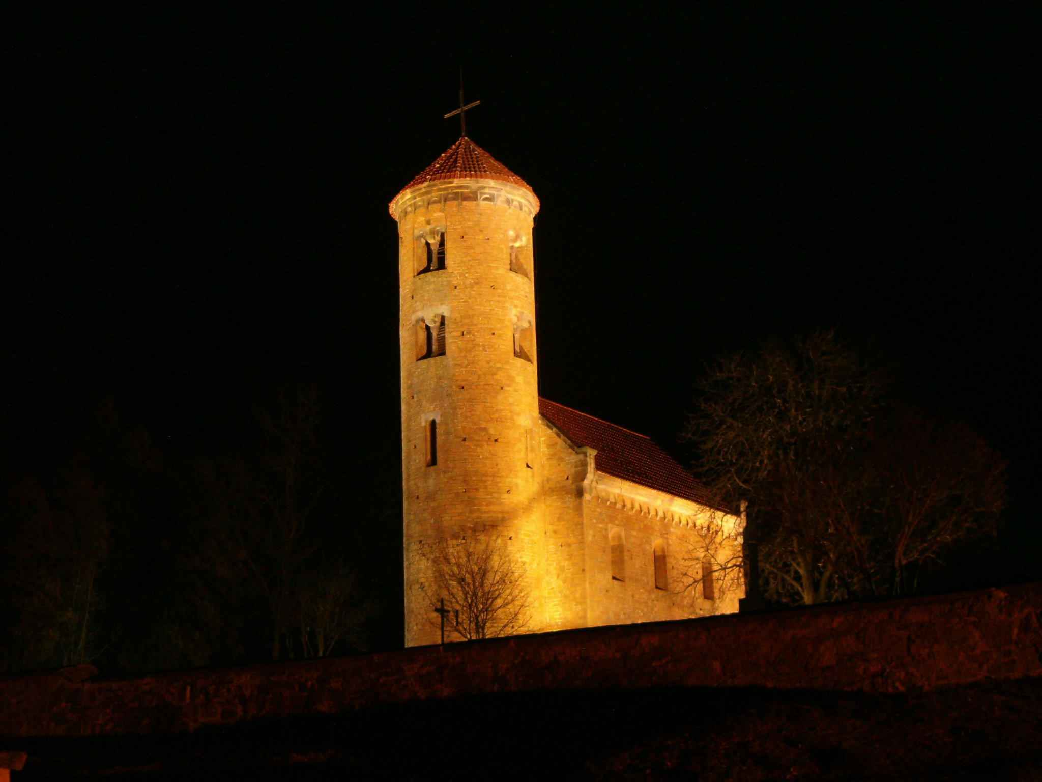 Kościół filialny p.w. św. Idziego w Inowłodzu (nocą).